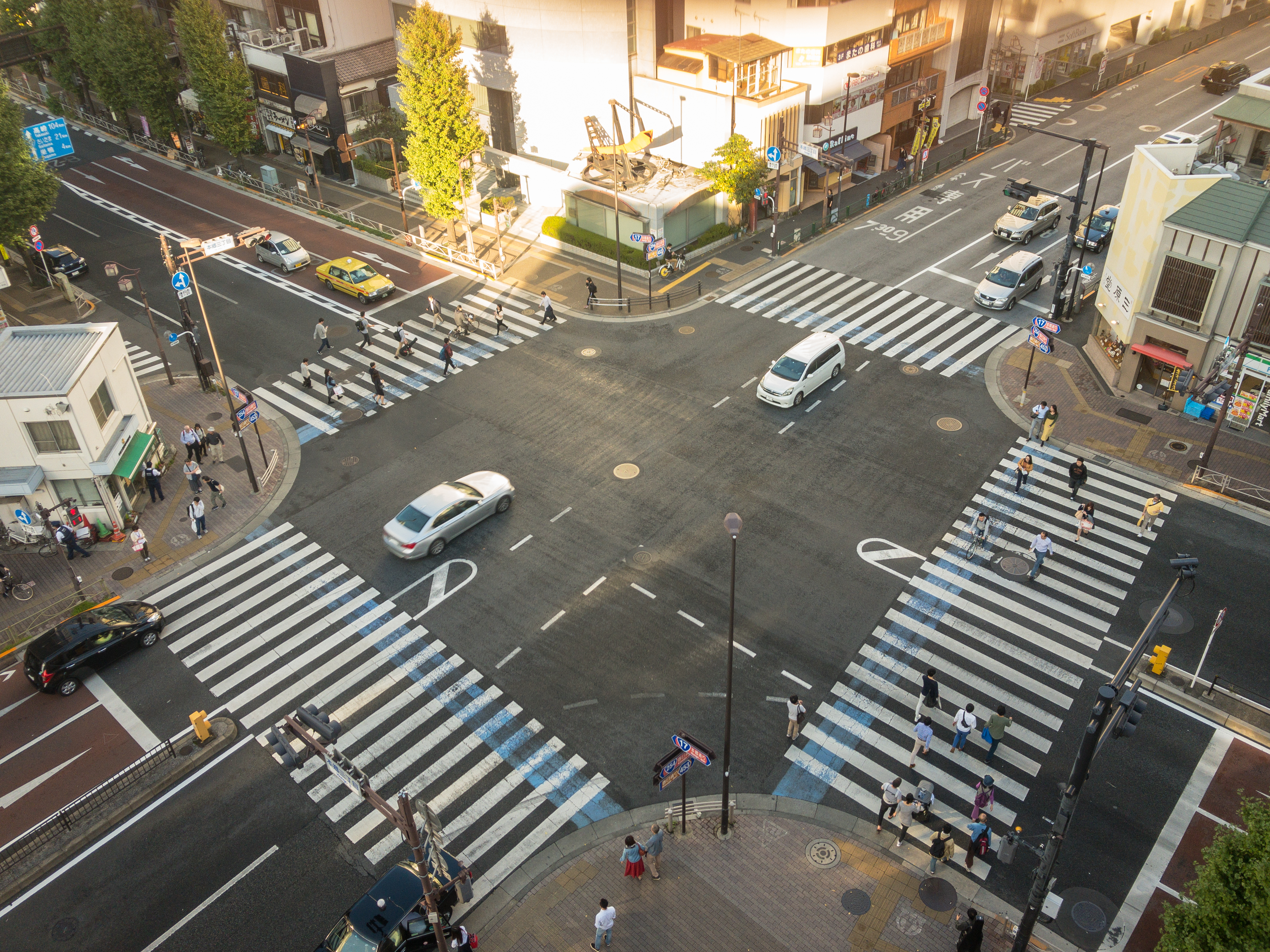 東京都文京区本郷三丁目交差点。写真左上の道路から時計回りに、北・東・南・西方向。